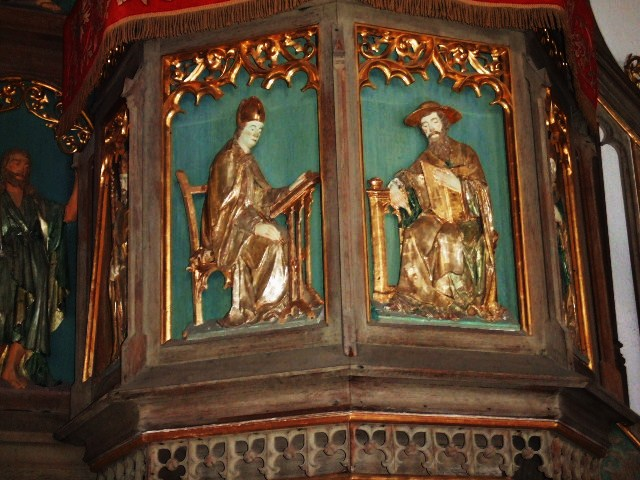 Pfarrkirche St. Blasius, Diepolz, Stadt Immenstadt im Allgäu Kanzel